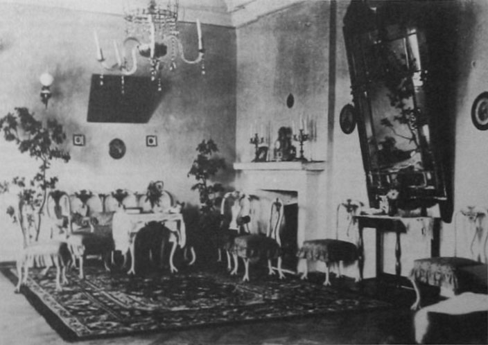 Беларуская (тарашкевіца): Ішчална (Iščałna), сядзіба Ласковічаў (Łaskovič)